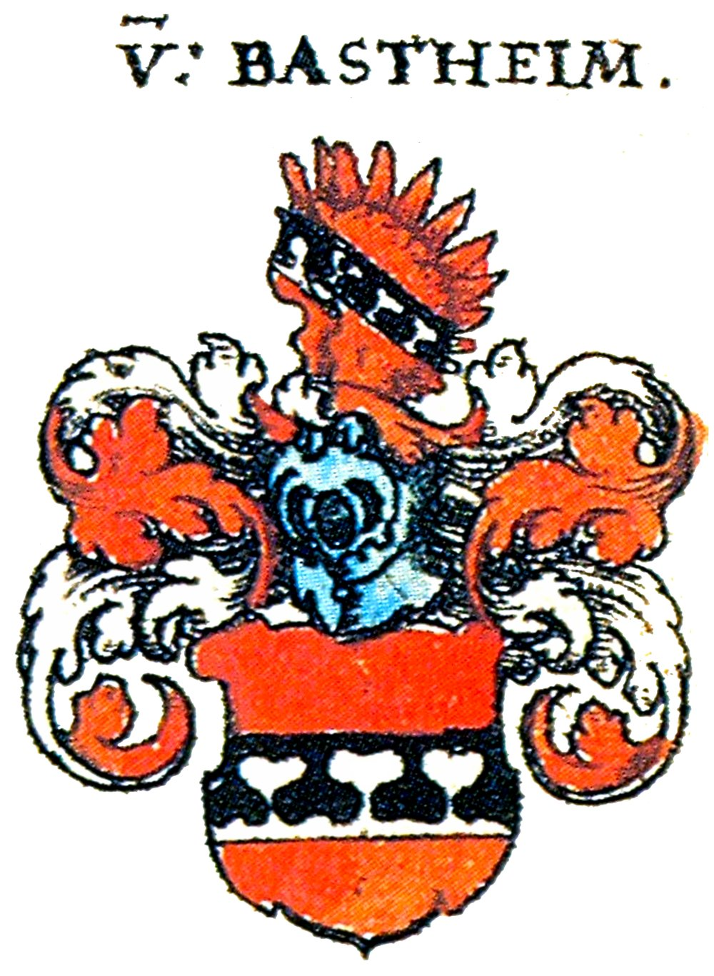 Ritterschaft und Adel in Franken Wappen der Familie von Bastheim